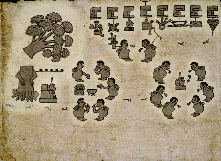 Parada junto al árbol